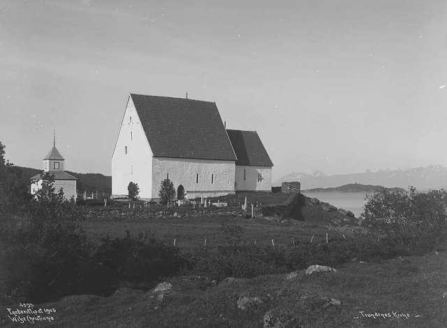 Trondenes kyrkje